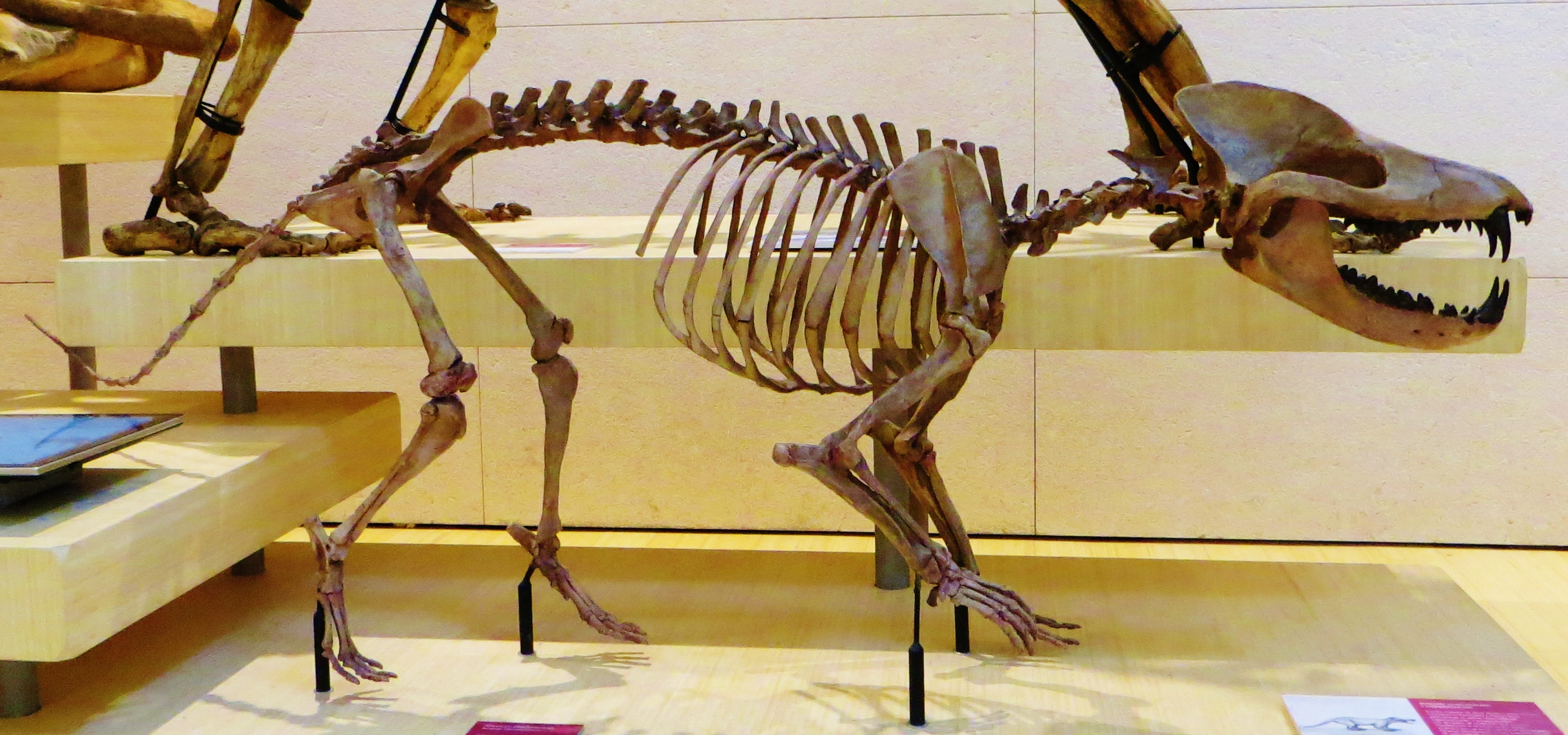 Fossil of Sinonyx, an extinct mammal- Took the picture at Muse (Trento)